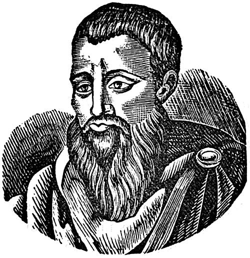 Illustrazione da Istoria della città di Benevento dalla sua origine fino al 1894, di Enrico Isernia, Benevento, 1896.